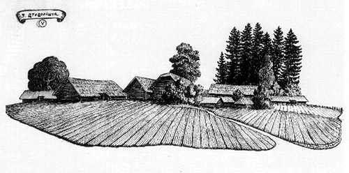 Стадолішча. 1919. Папера, туш, пяро. 11,2x17,8 Нацыянальны музей, Вільнюс